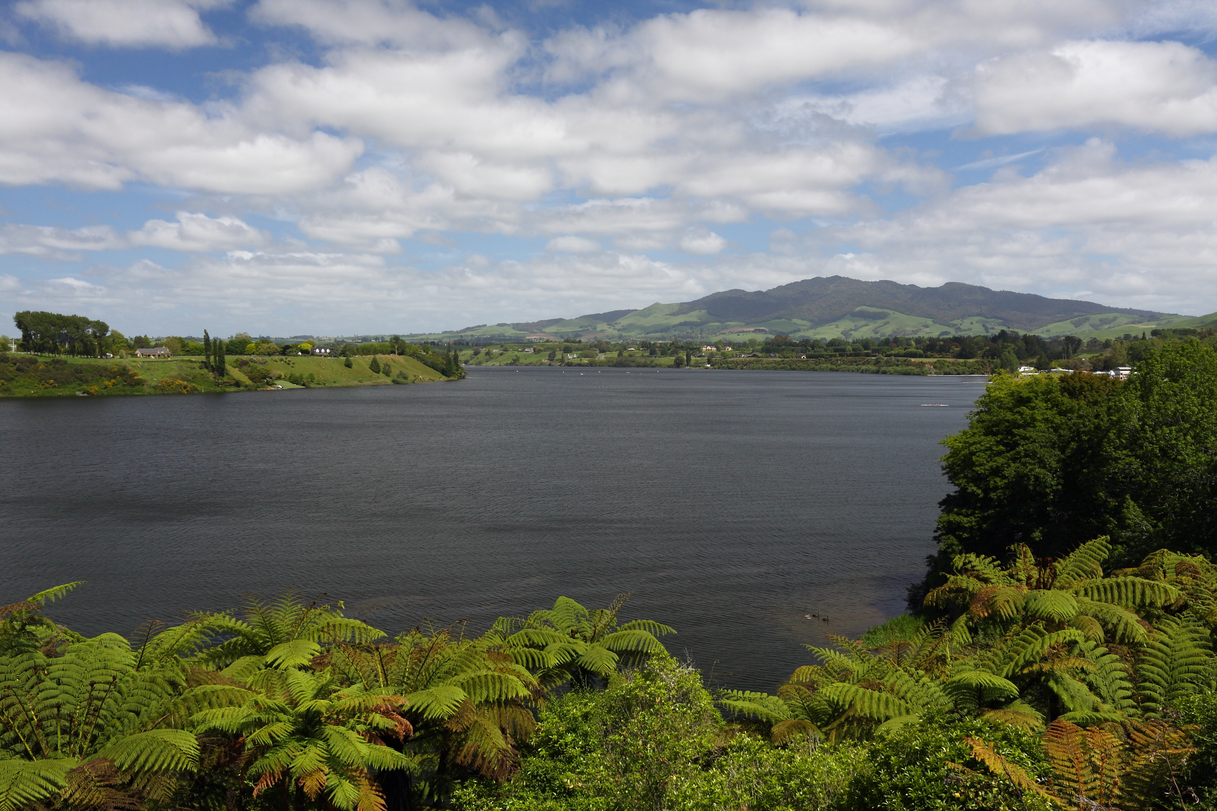 Lake Karapiro